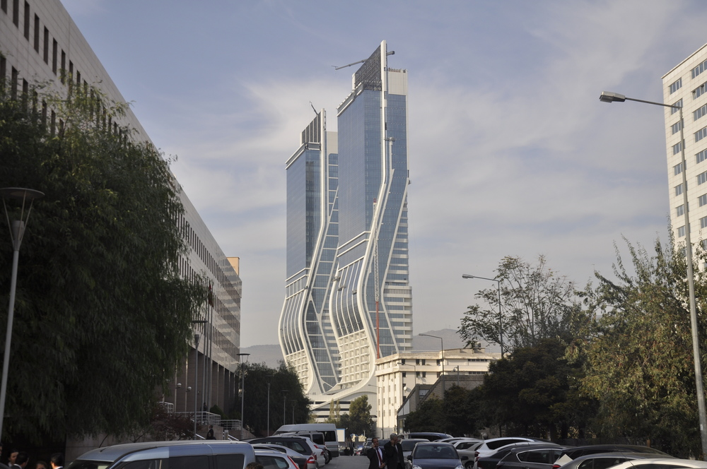 bitmiş olan hali